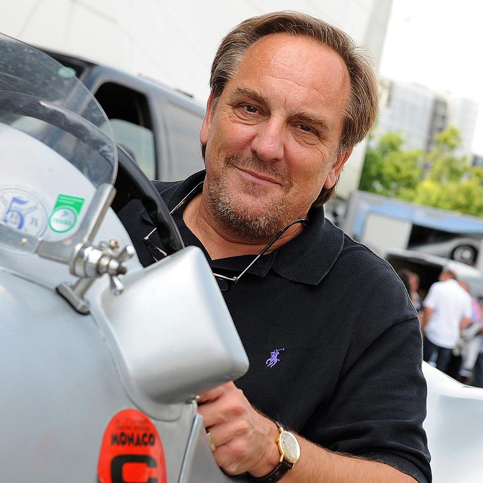 Portraitfoto Wolfgang Blaube